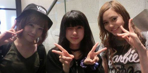 Reverse M、2016年